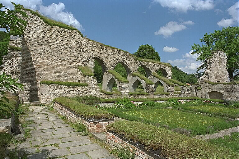 Korsgången. Motiv: Alvastra kloster Nyckelord: Raä-Fastigheter Kategori: Kloster Korsgången.